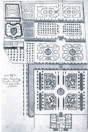 Schloss Schieder: Plan des barocken Schlossgartens um 1760